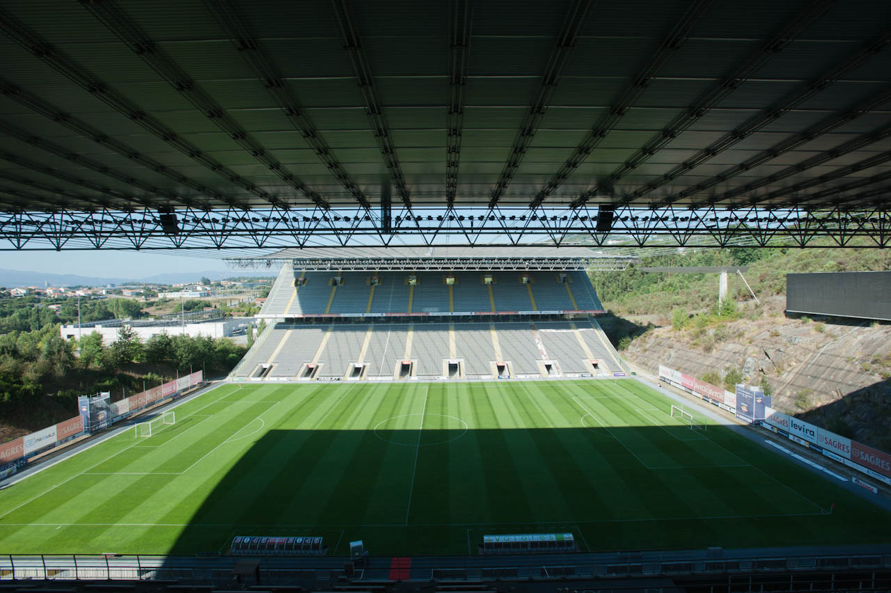 Estadio Municipal de Braga Eduardo Souto de Moura 2000/2003 2011-08-17